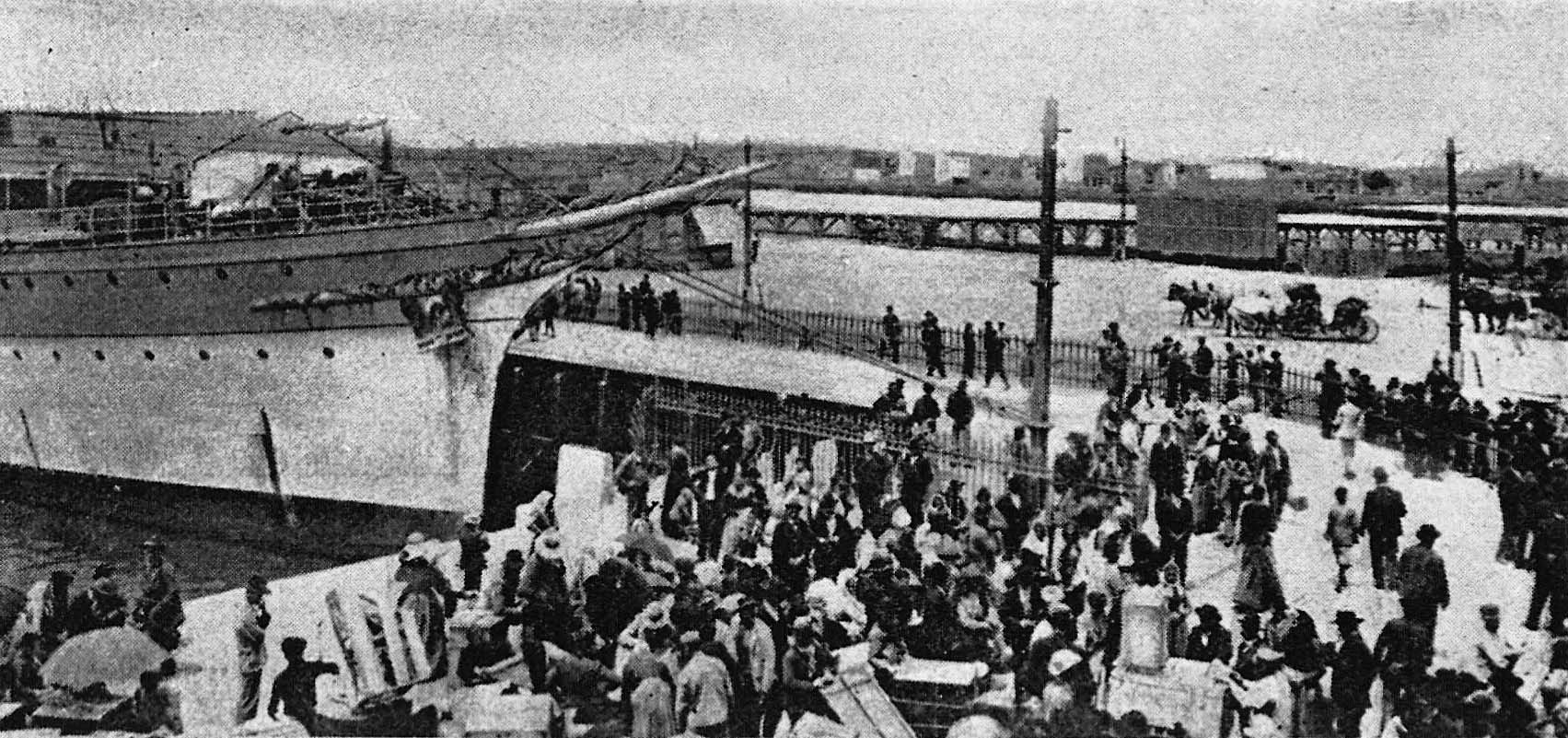 Débarquement d'immigrants à la Darse Sud. Port de Buenos Aires